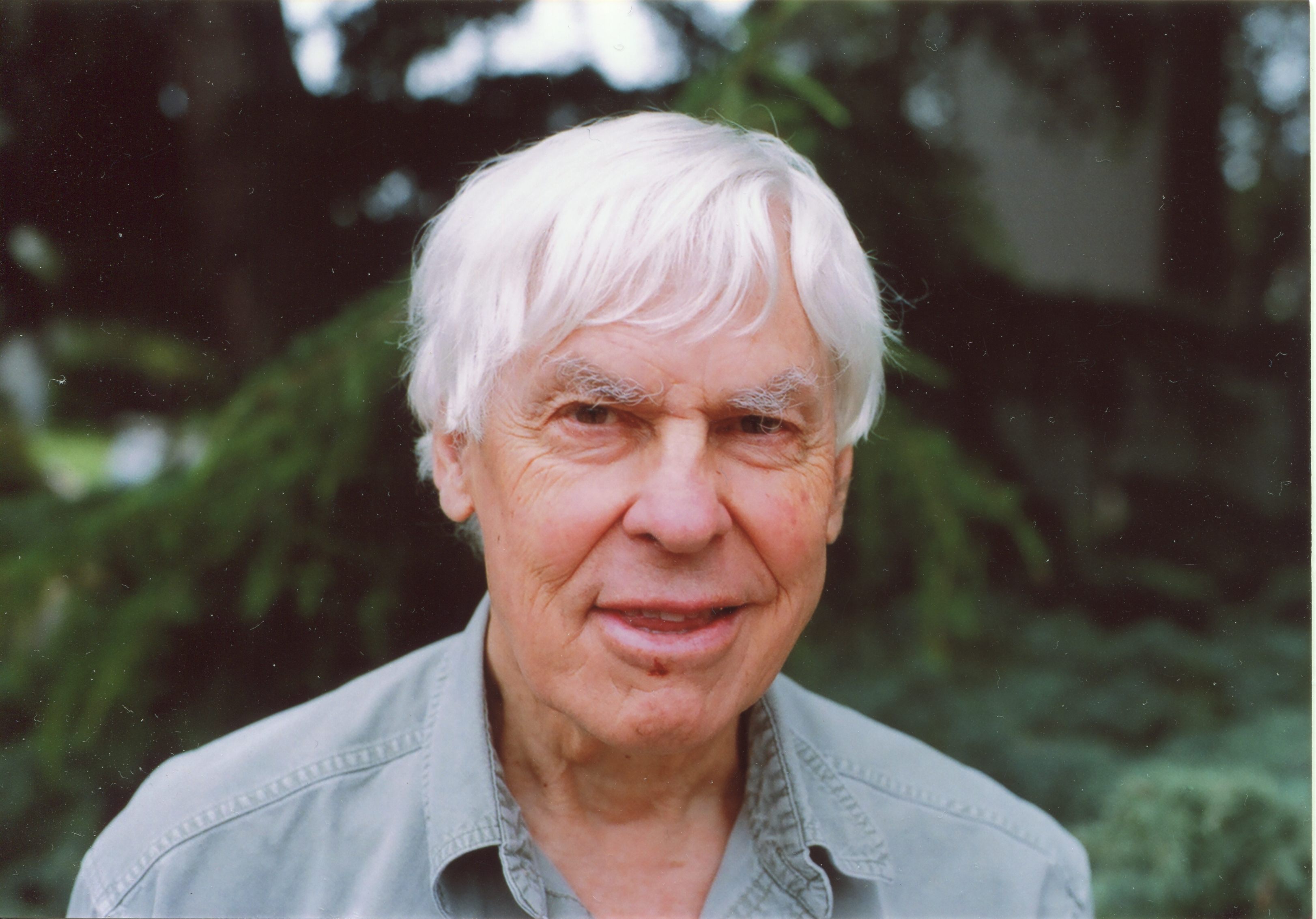 Stephen Smale in 2008